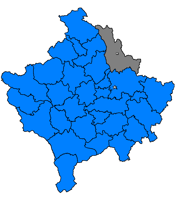 Podujevë, Kosovë 2006